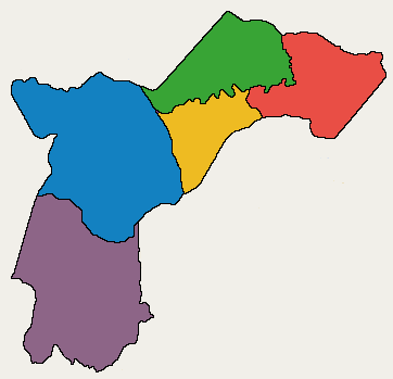 DIVISÃO DISTRITOS BANABUIU